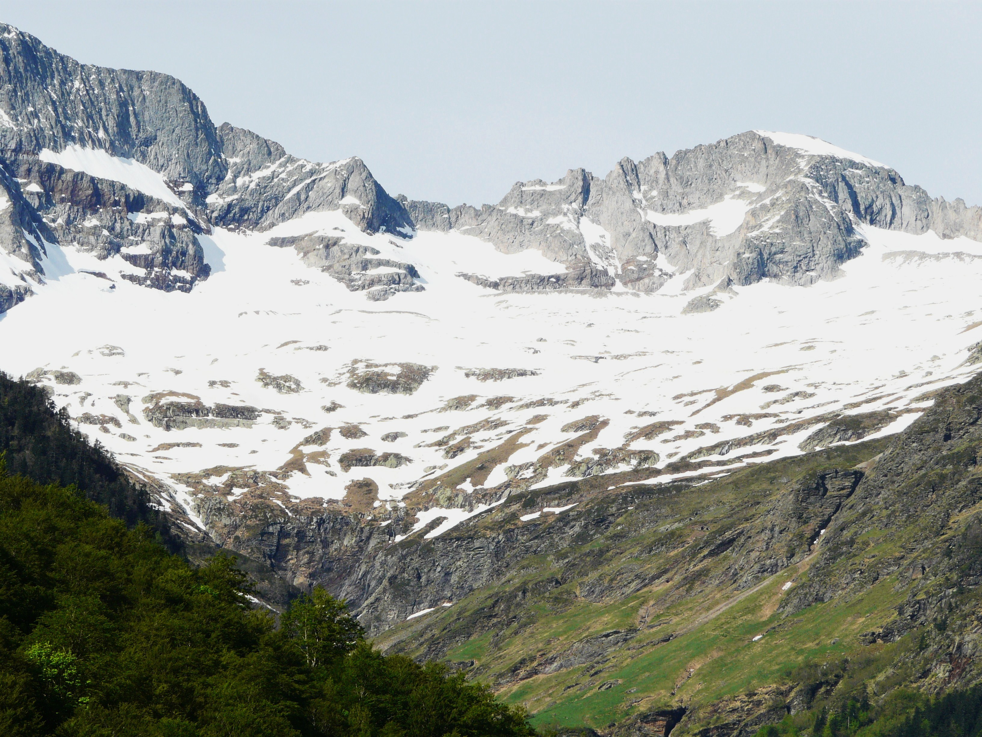 La partie orientale du cirque des Crabioules, Castillon-de-Larboust, Haute-Garonne, France.